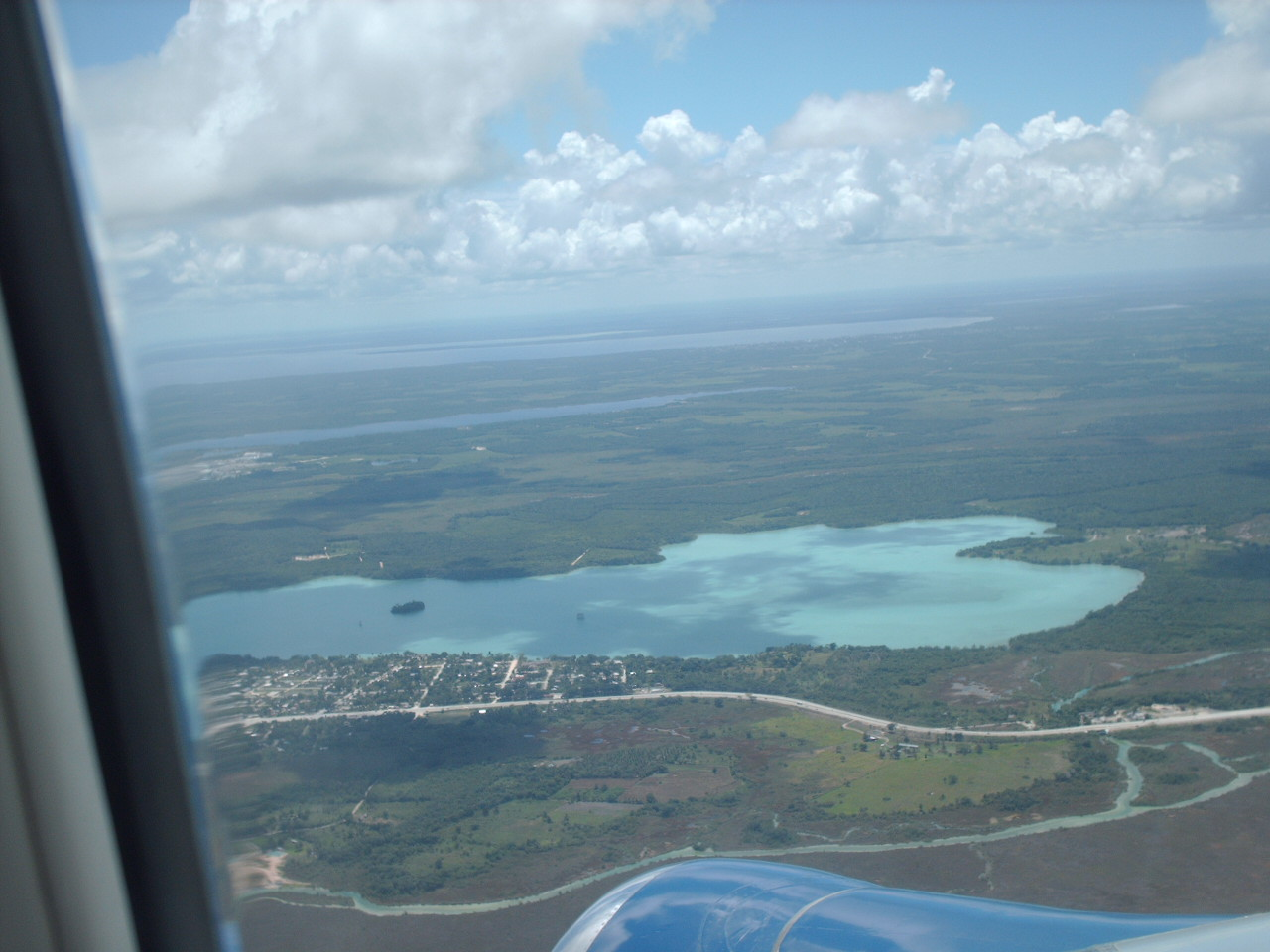 Imagen de la población de Huay Pix, Quintana Roo, México